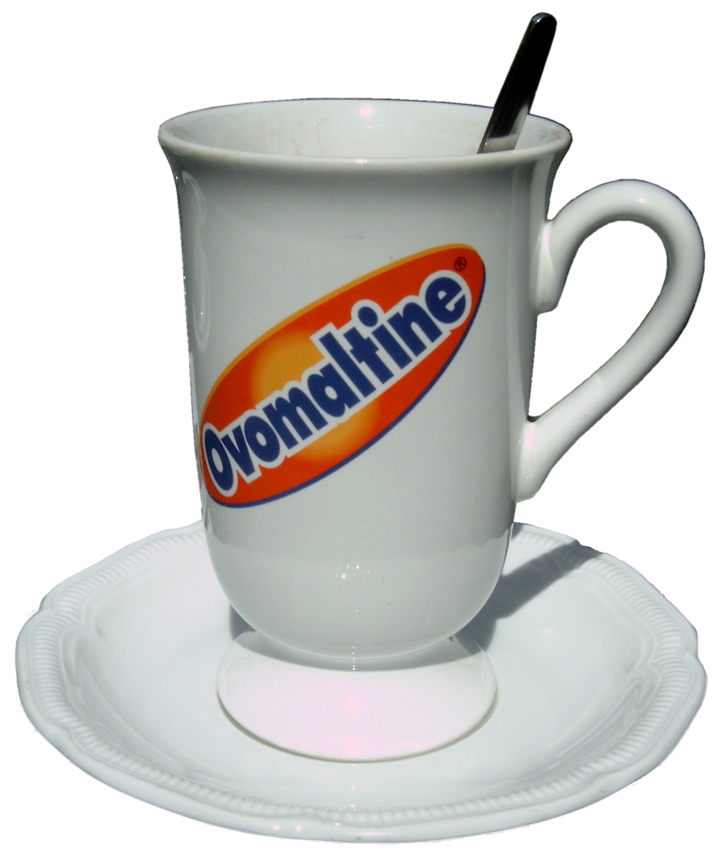 Tasse mit "original" Schweizer Ovomaltine Ort der Aufnahme: Gartenwirtschaft in der Ostschweiz